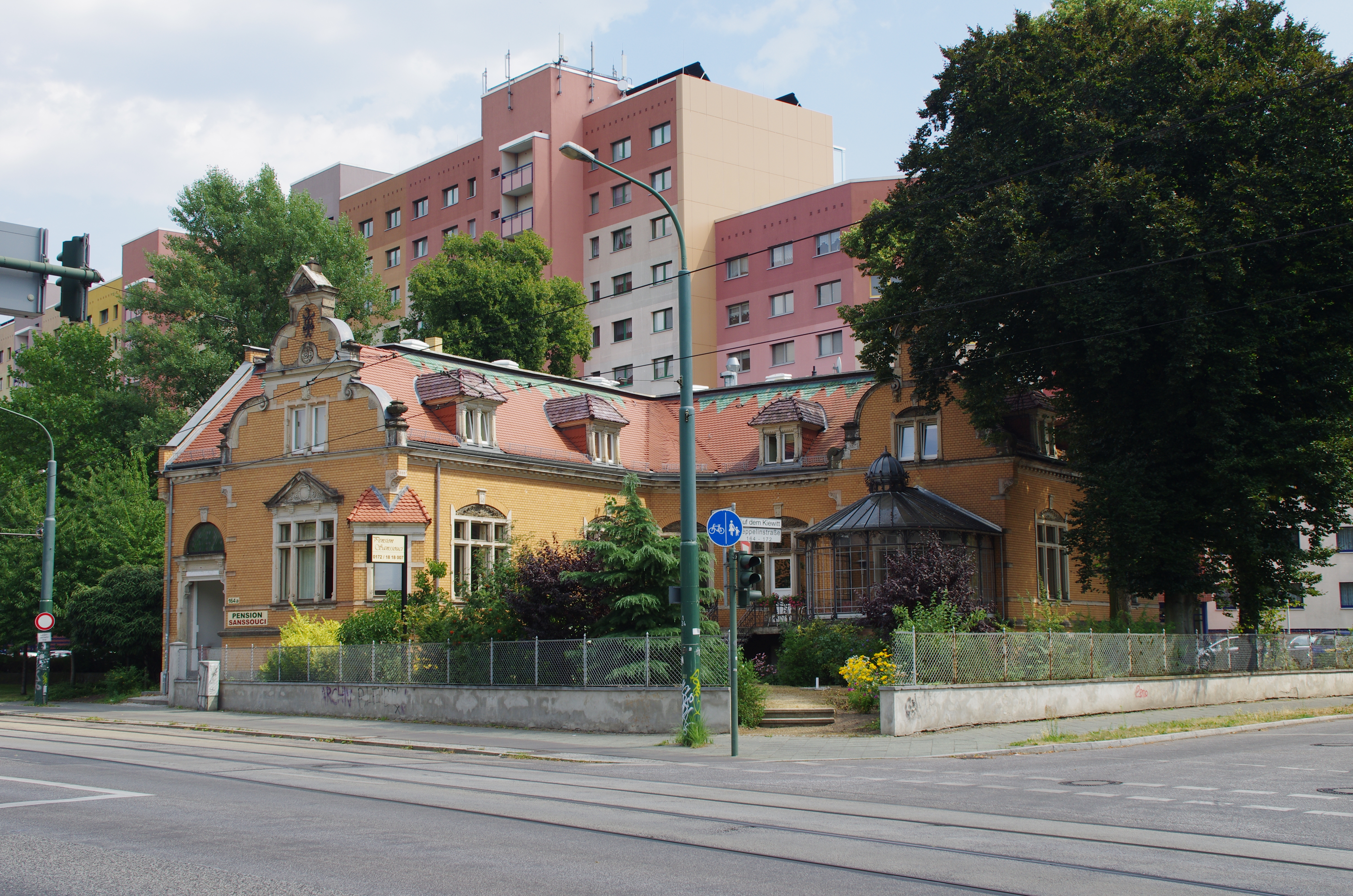 Potsdam in Brandenburg. Das Haus in der Zeppelinstraße 164a steht unter Denkmalschutz.